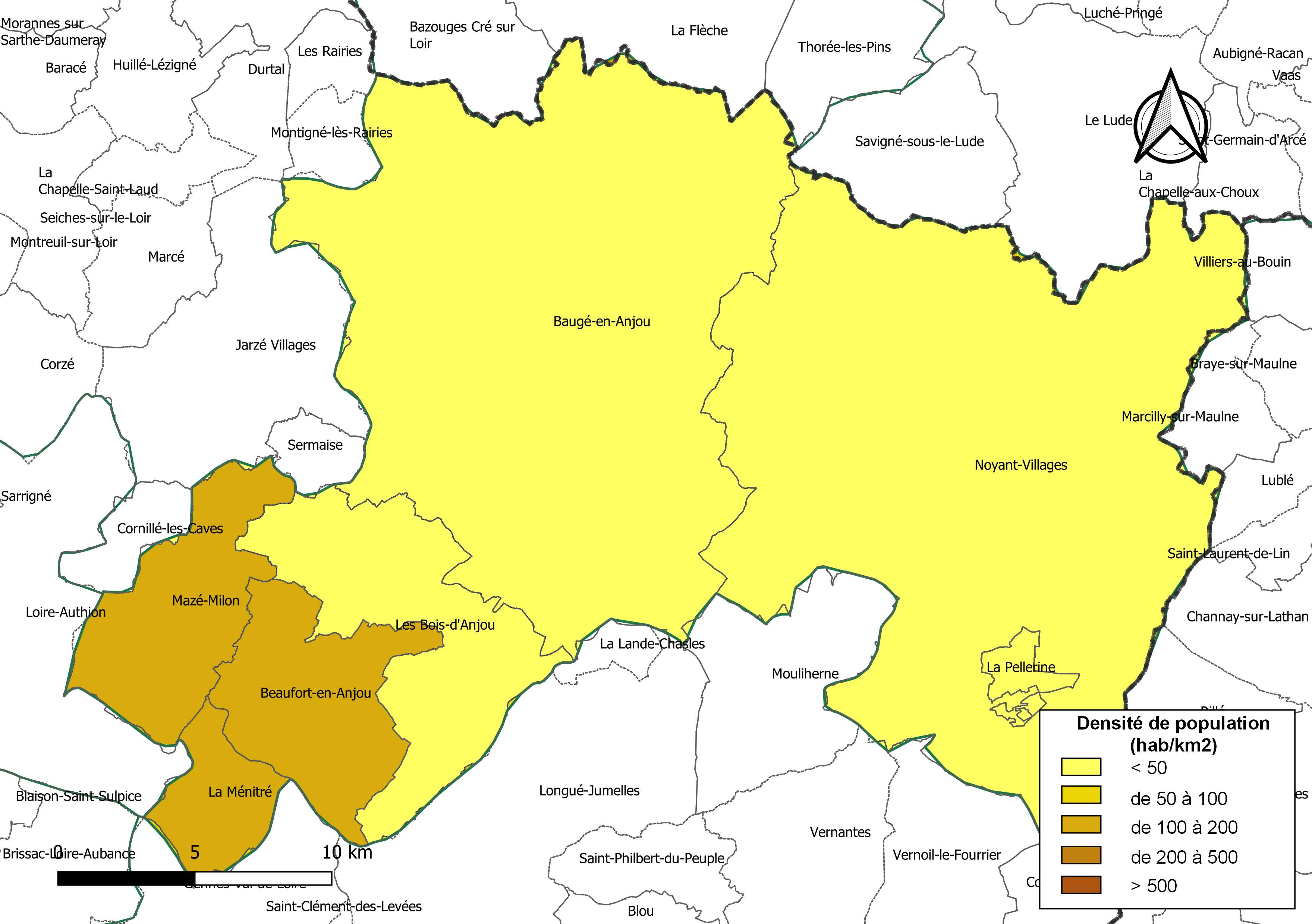 Carte des densités de population (millésimée 2016) des communes de la Communauté de communes Baugeois Vallée, département de Maine-et-Loire, France. Composition au 1er janvier 2019.